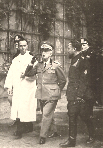 Per gentile concessione della Fondazione G. Sanvenero Rosselli